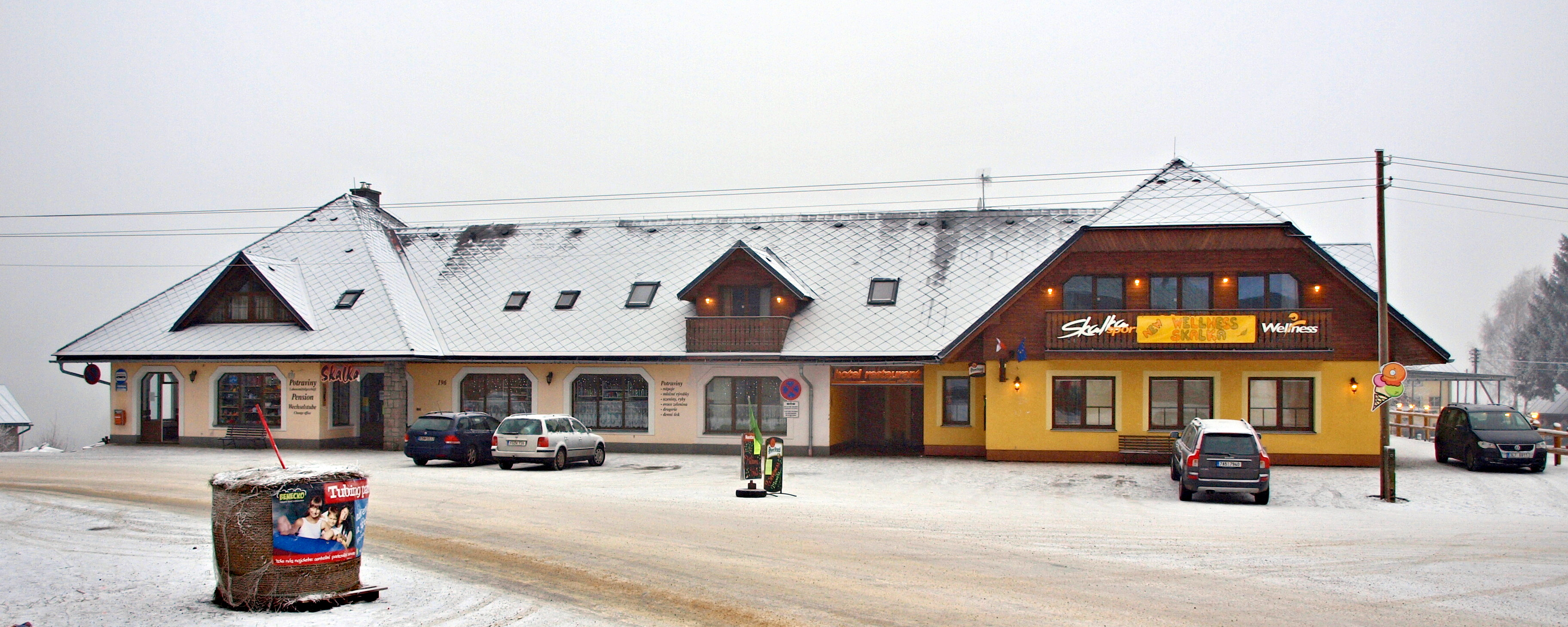 Krkonoše, Benecko